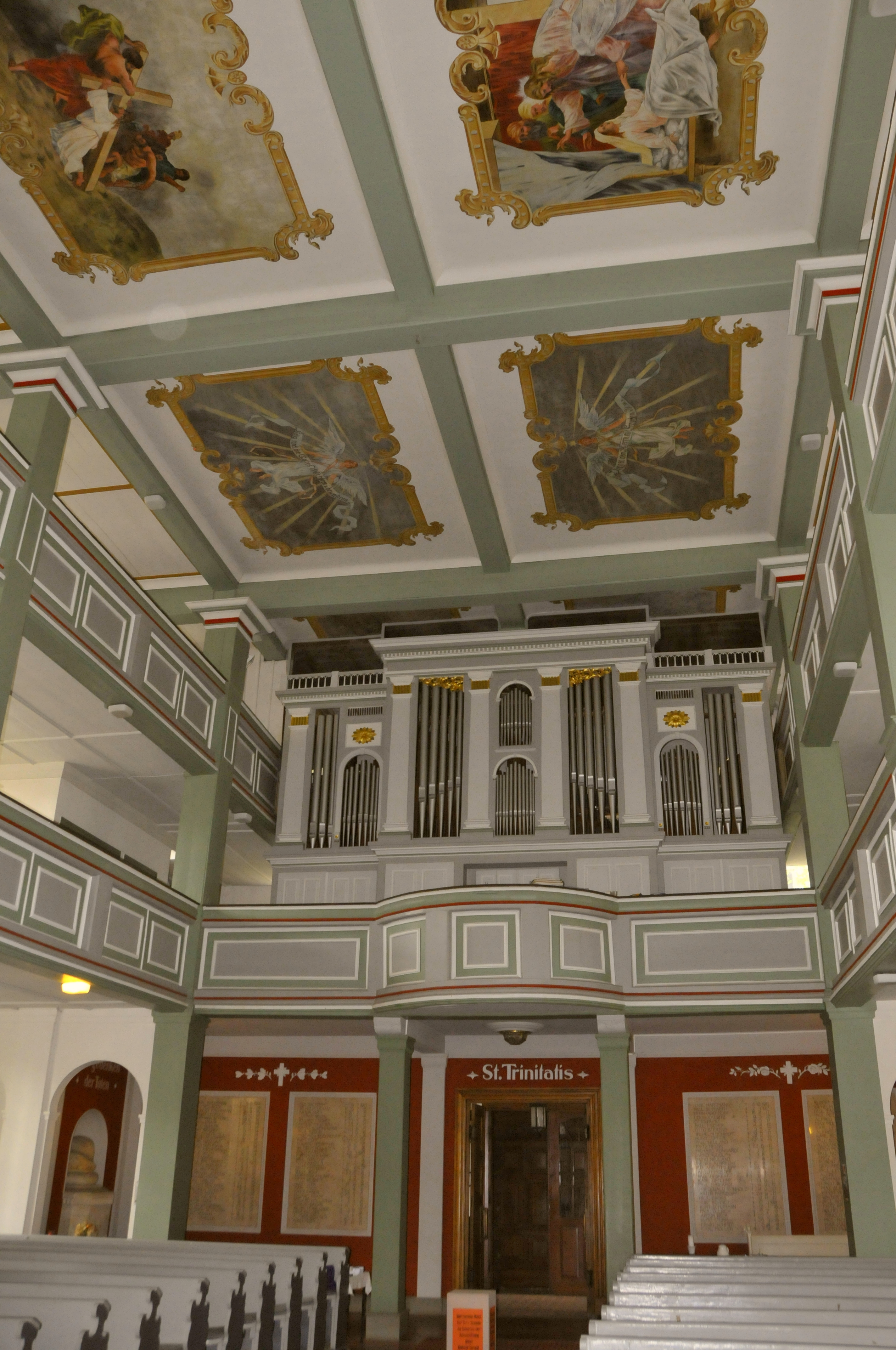 Ohrdruf, Trinitatiskirche mit Ratzmann-Orgel